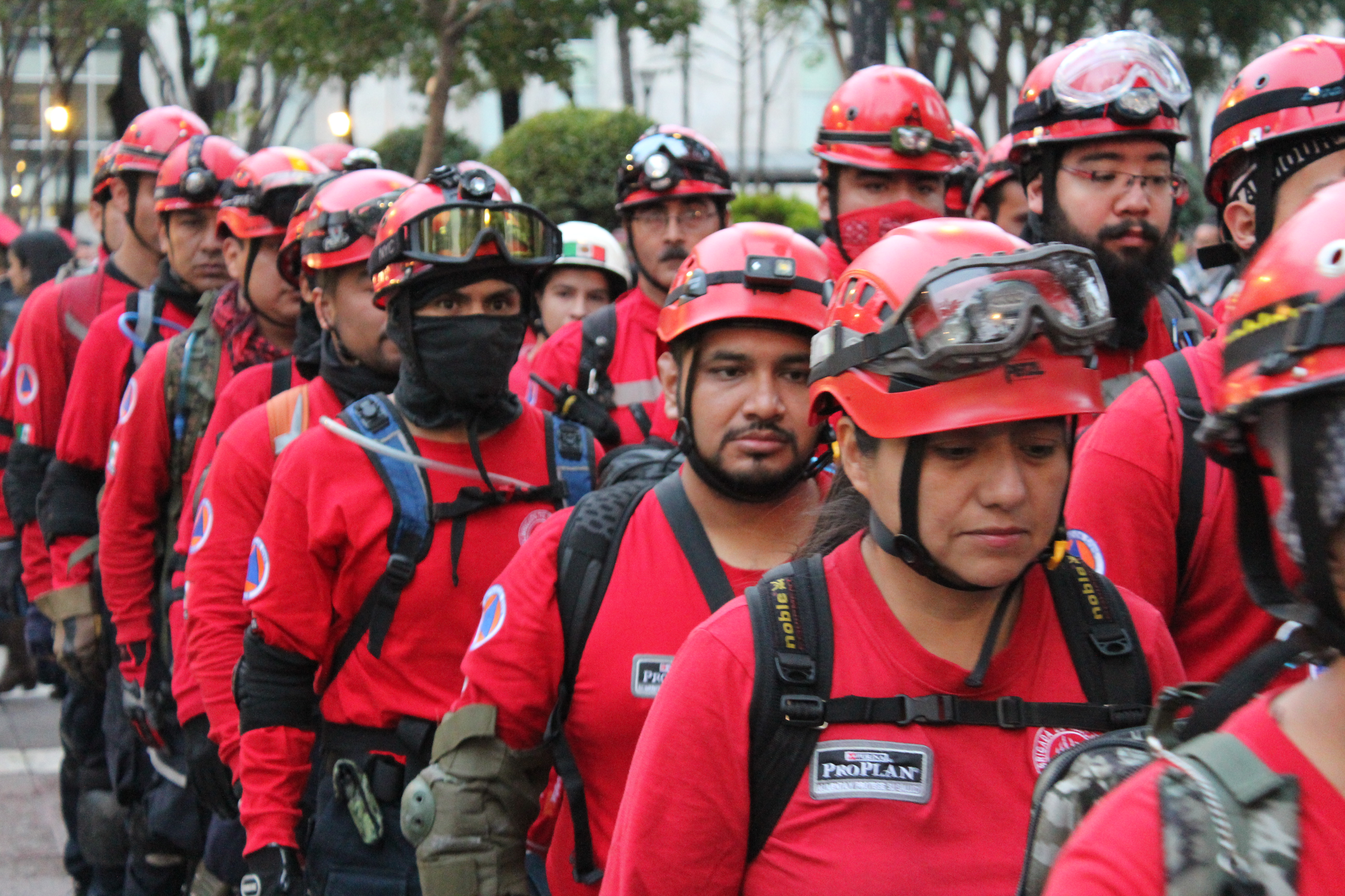 Ceremonia luctuosa por 30 años del Terremoto de México de 1985 - Plaza de la Solidaridad, Ciudad de México, México.